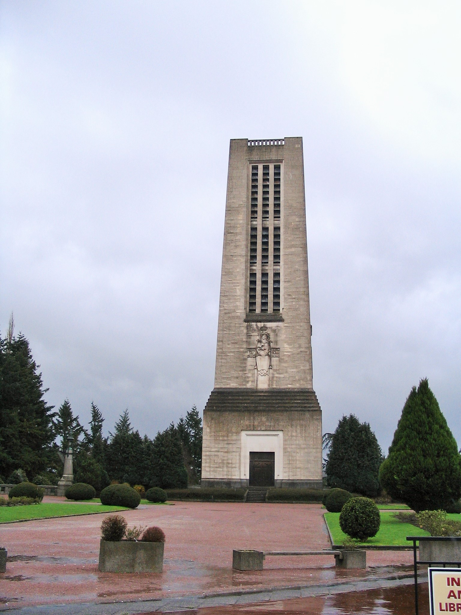 campanile